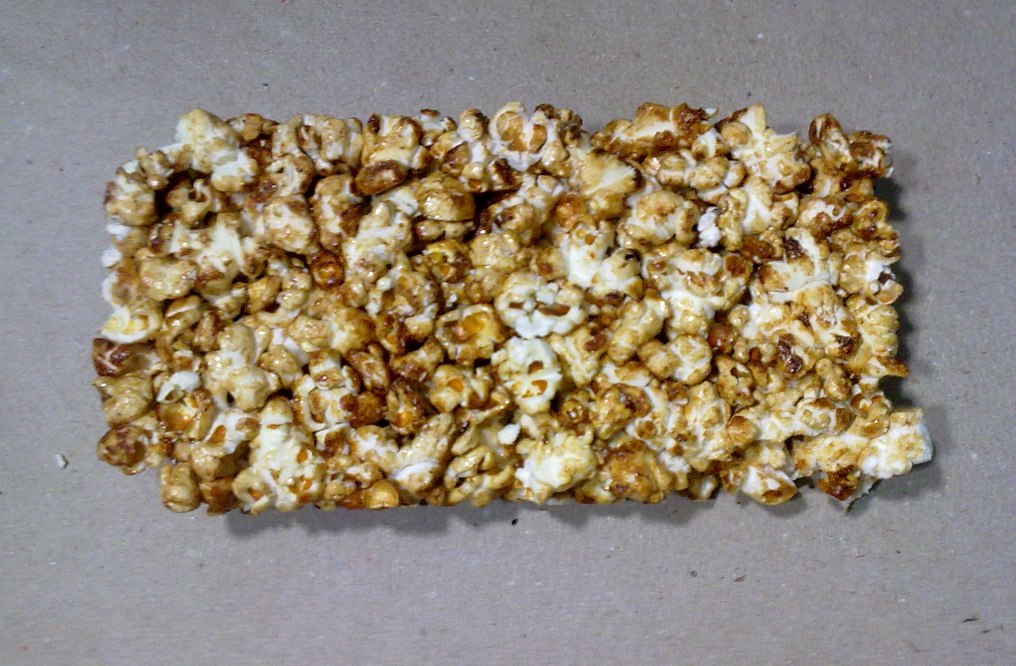 Rositas de maíz prensadas.